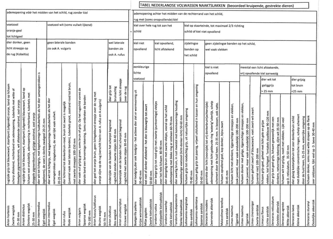 Table with species of Slugs in Dutch